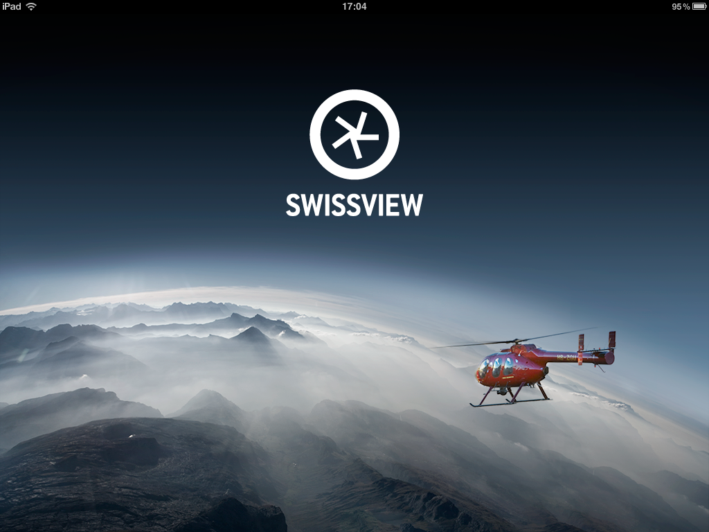 SWISSVIEW